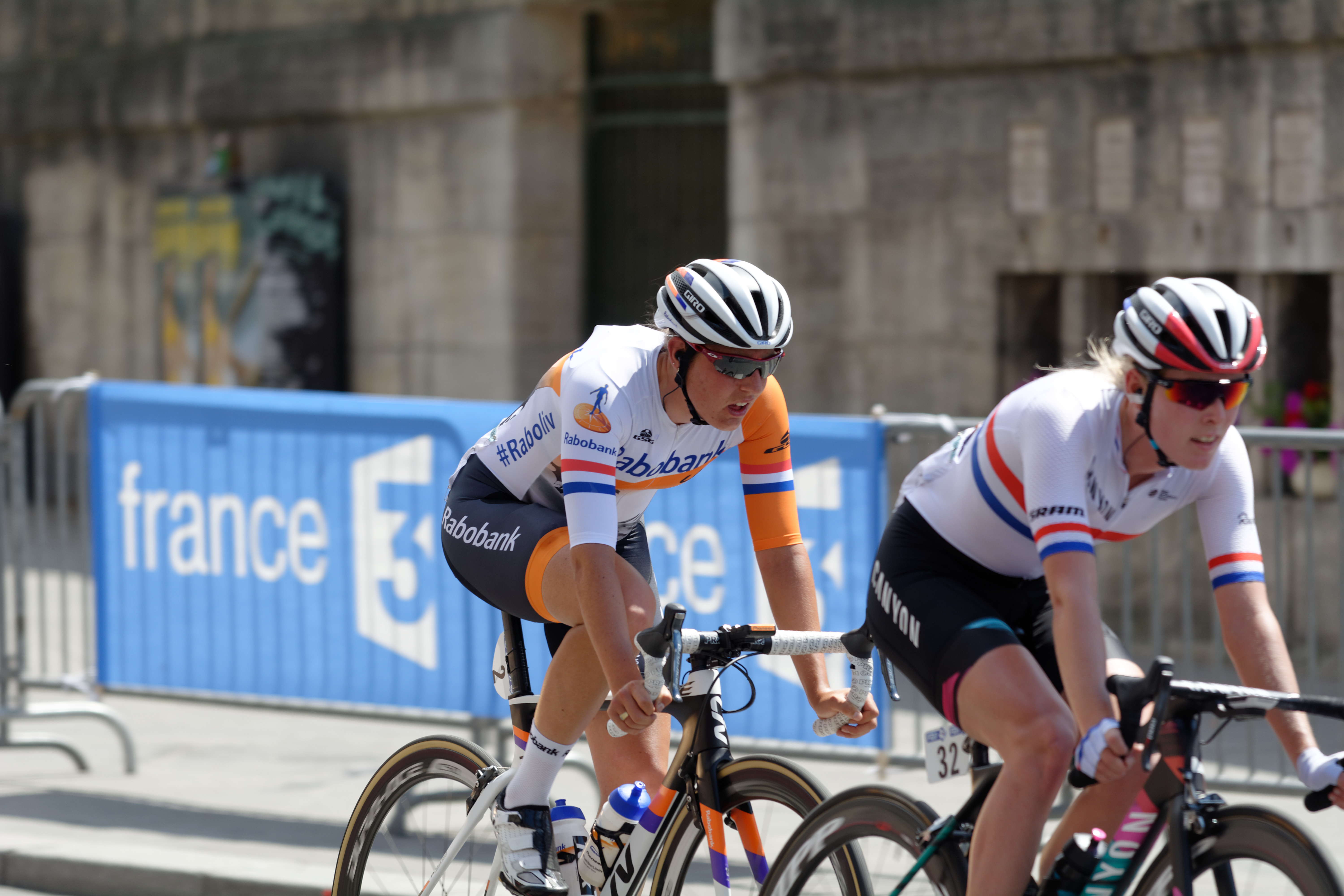 D71_9335_DxO